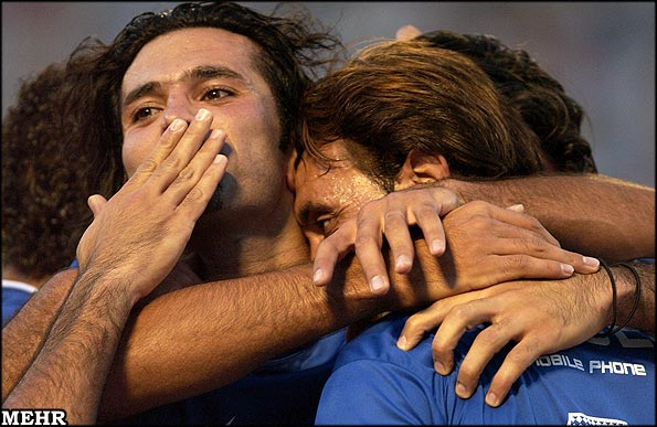 دیداری که در آن تيم فوتبال استقلال تهران در اولين هفته پنجمين دوره رقابتهاي ليگ برتر موفق شد تيم صباباتري را در ورزشگاه آزادي تهران با نتيجه 4 بر1 شكست دهد. (گزارش)